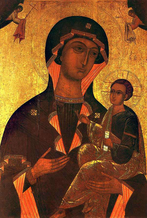 Маці Боская Адзігітрыя Іерусалімская. 16 ст. Варварынская царква (1642 - 1647) Пінск. Дошка, яечная тэмпера. 188х139х2,5.